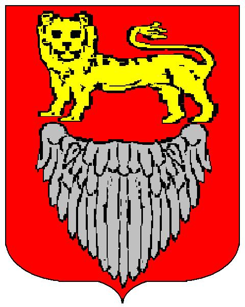 Grb obitelji Marulić